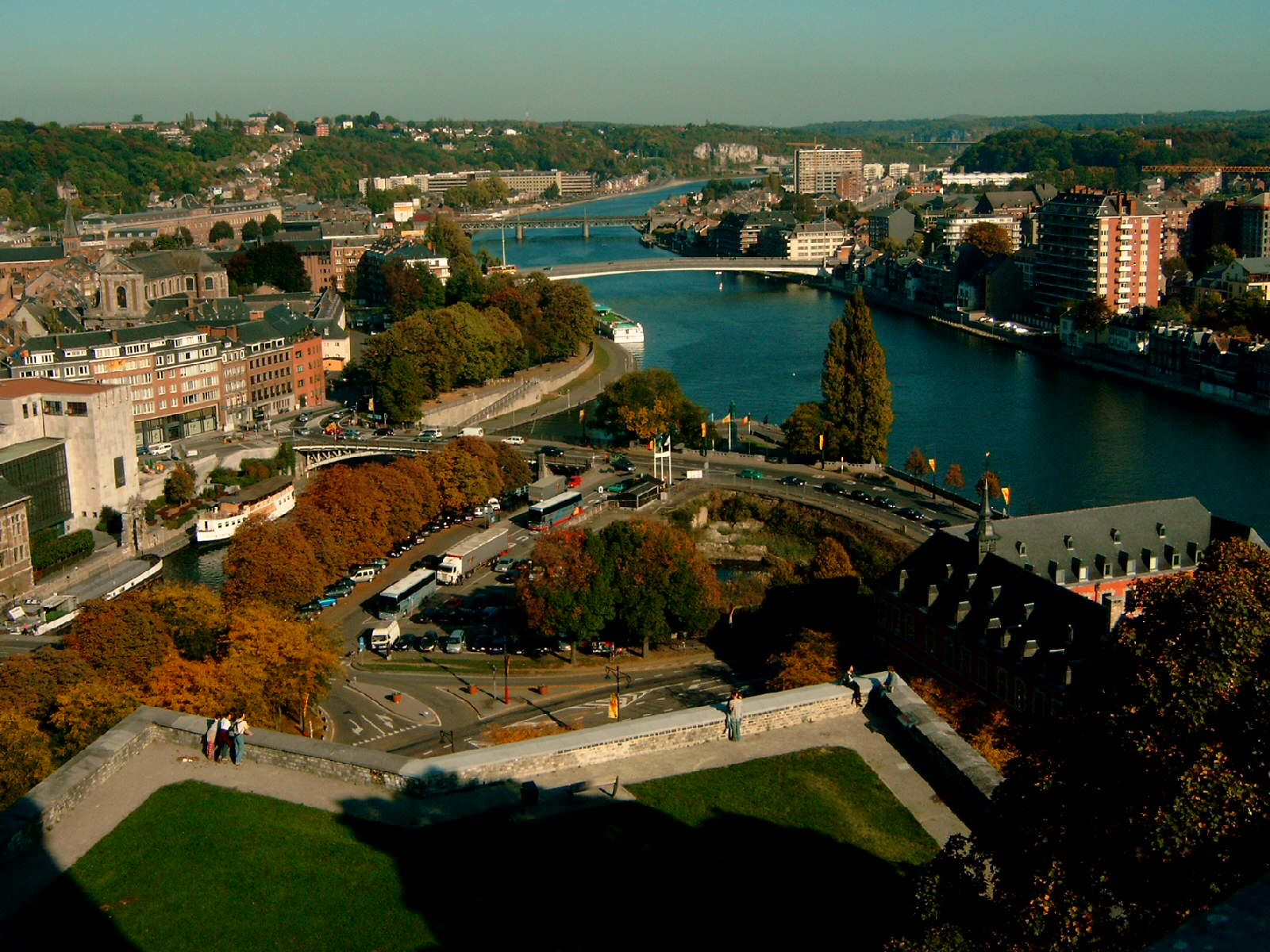 Samenvloeiing van de Maas en de Samber (Sambre). Eigen opname van 16-10-2005, ter beschikking gesteld aan Wikipedia.